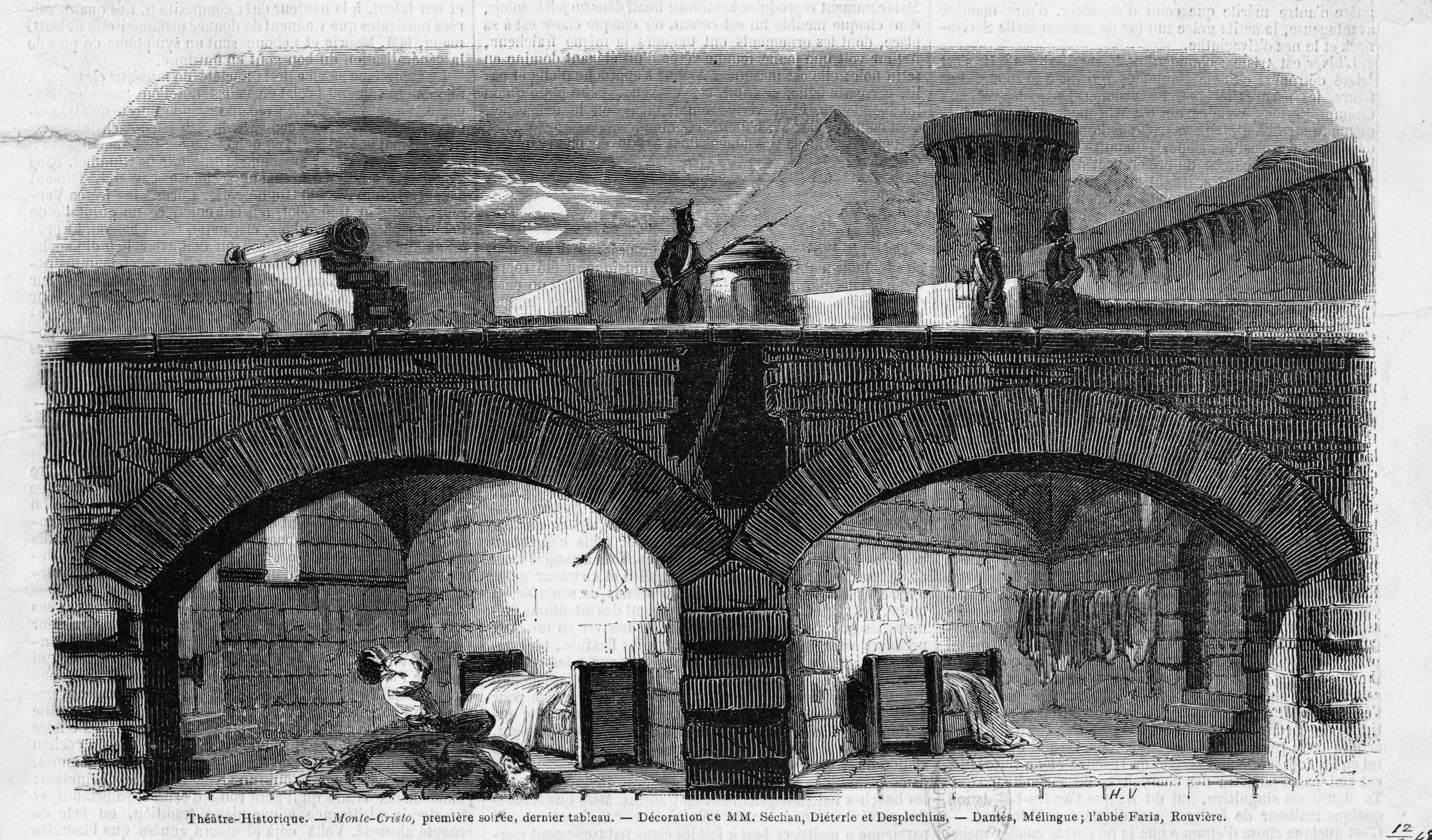 Théâtre-Historique. Monte-Cristo, première soirée, dernier tableau. Décoration de MM. Séchan, Diéterie et Desplechins. Dantès, Mélingue ; l'abbé Faria, Rouvière : estampe